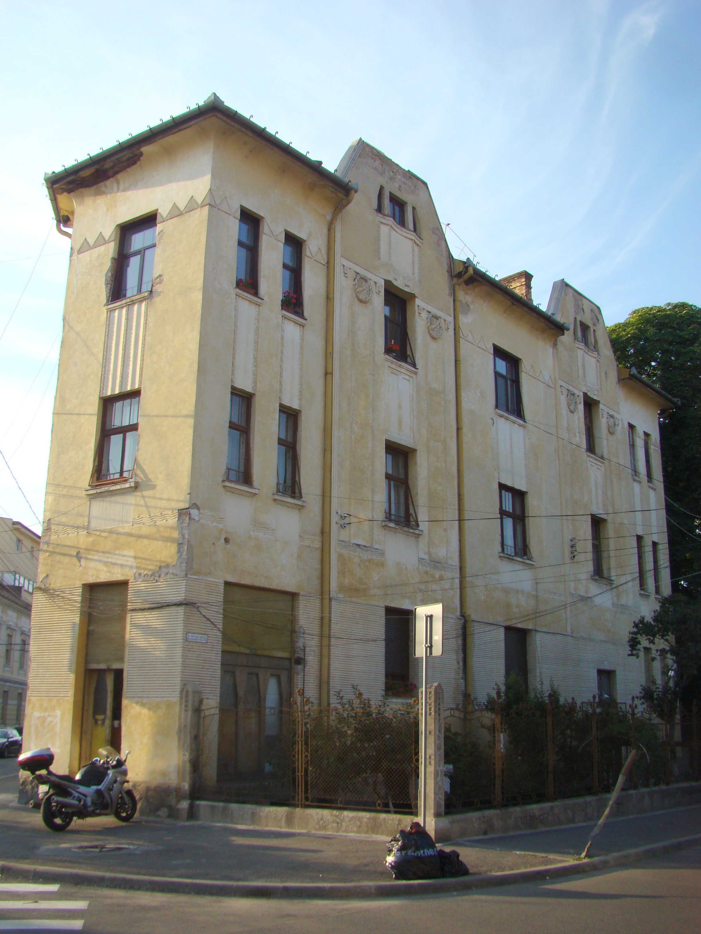 Clădire monument istoric, str. Borzești (în prezent Nicolae Cristea), nr.1